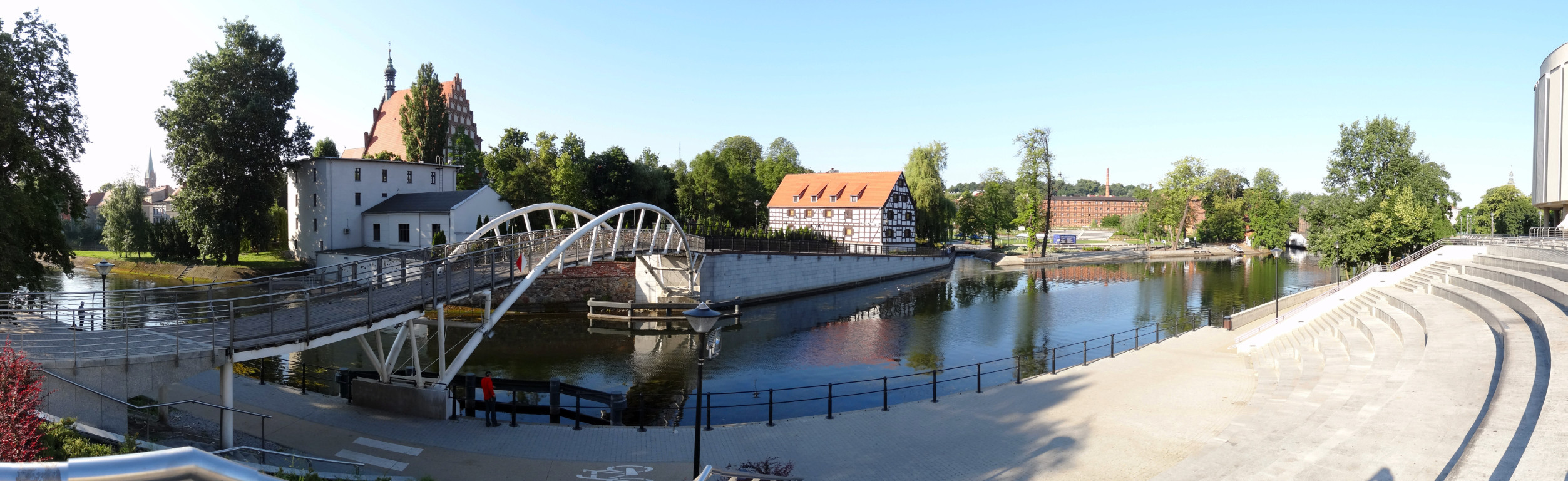 Katedra bydgoska, Biały Spichlerz i Wyspa Młyńska - widok z tarasu Opery Nova